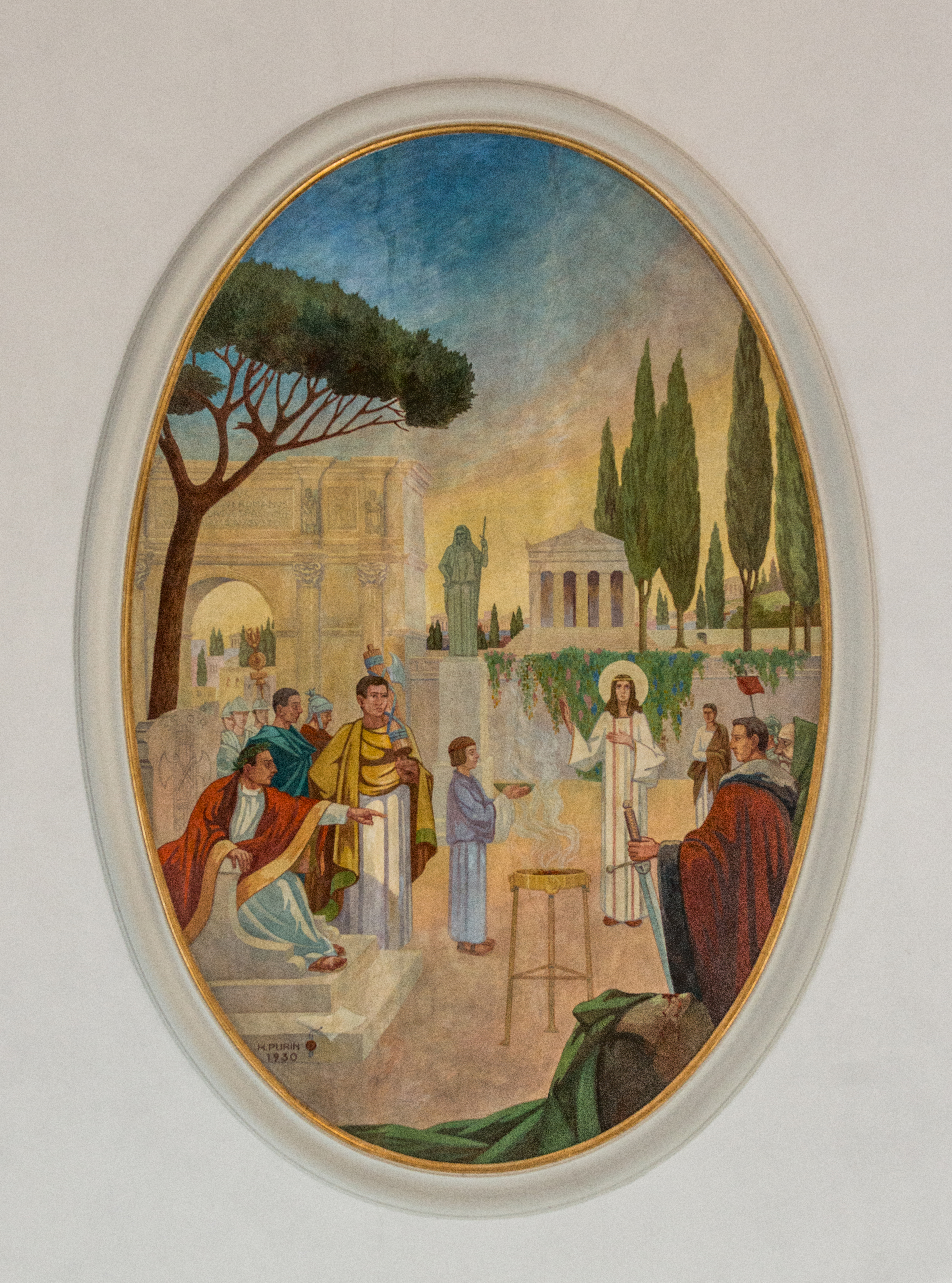 Stadtpfarrkirche hl.Sebastian im Oberdorf, Dornbirn